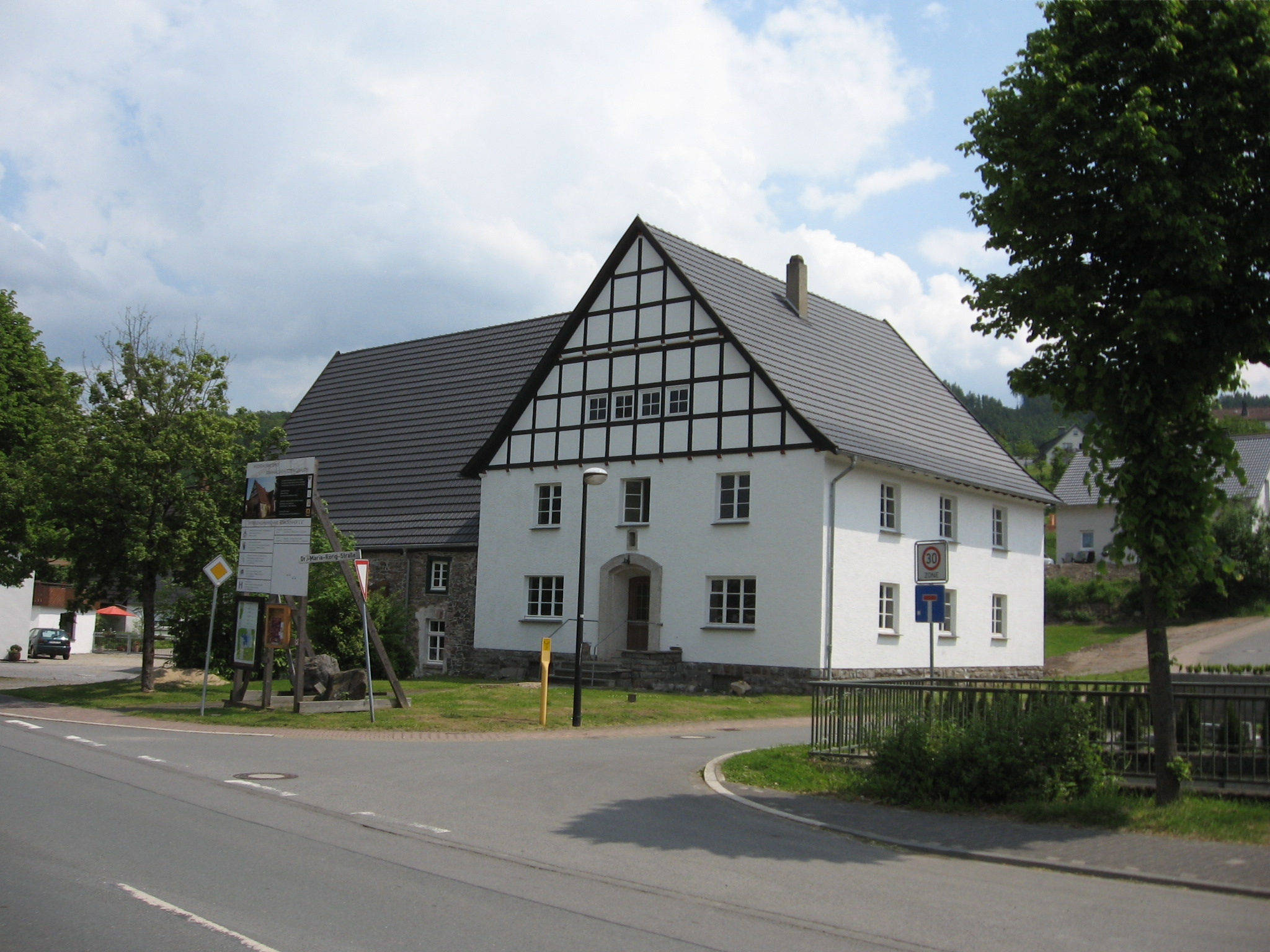 Strackenhof in Sundern-Endorf von Nordwesten